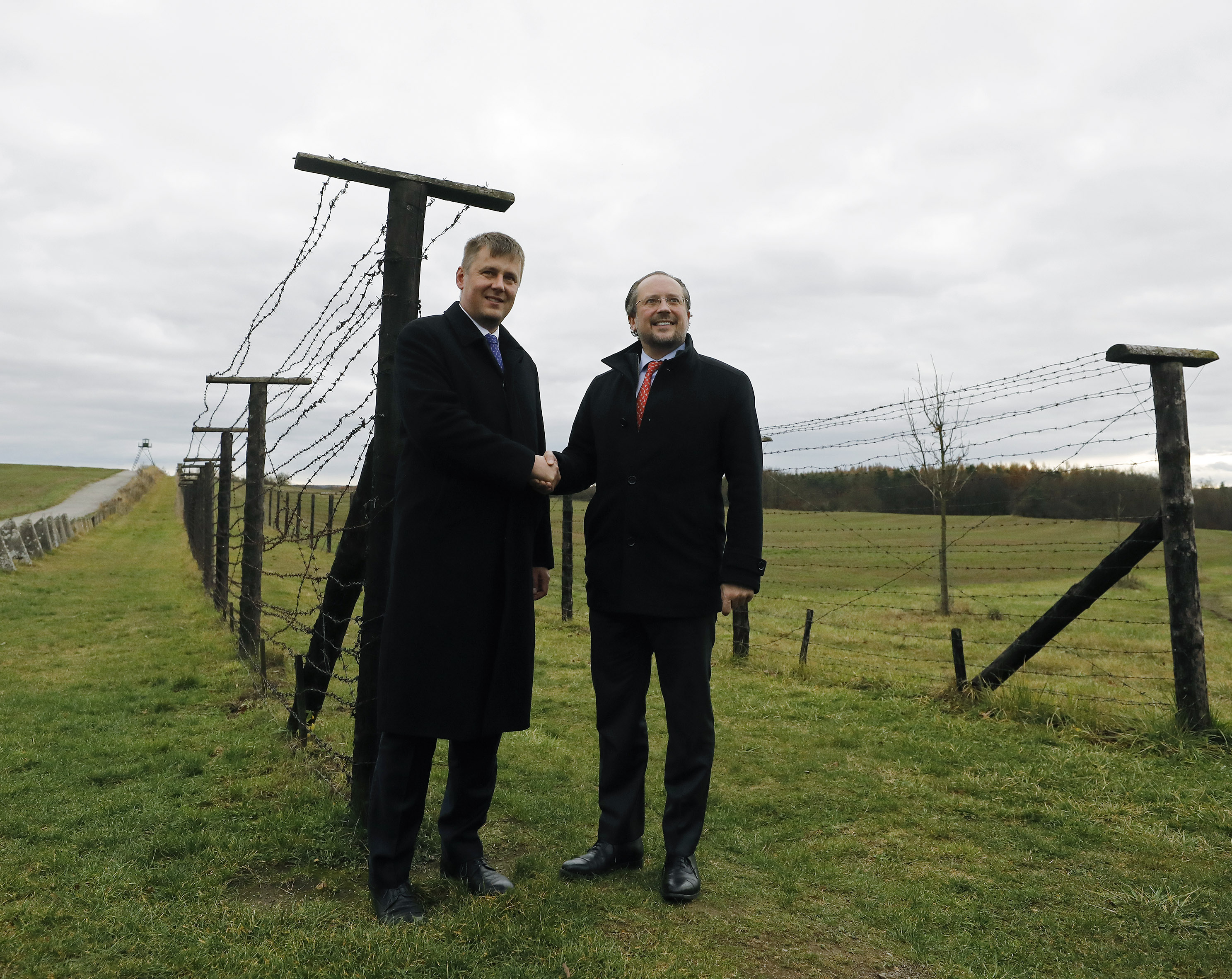 Gedenkveranstaltung in Hardegg - Cizov Anlässlich des 30. Jahrestags des Falls des Eisernen Vorhangs zwischen Österreich und der ehemaligen Tschechoslowakei mit BM Alexander Schallenberg und LH Mikl-Leitner sowie dem tschechischen Außenminister Tomas Petricek. 29.11.2019, Foto: Dragan Tatic